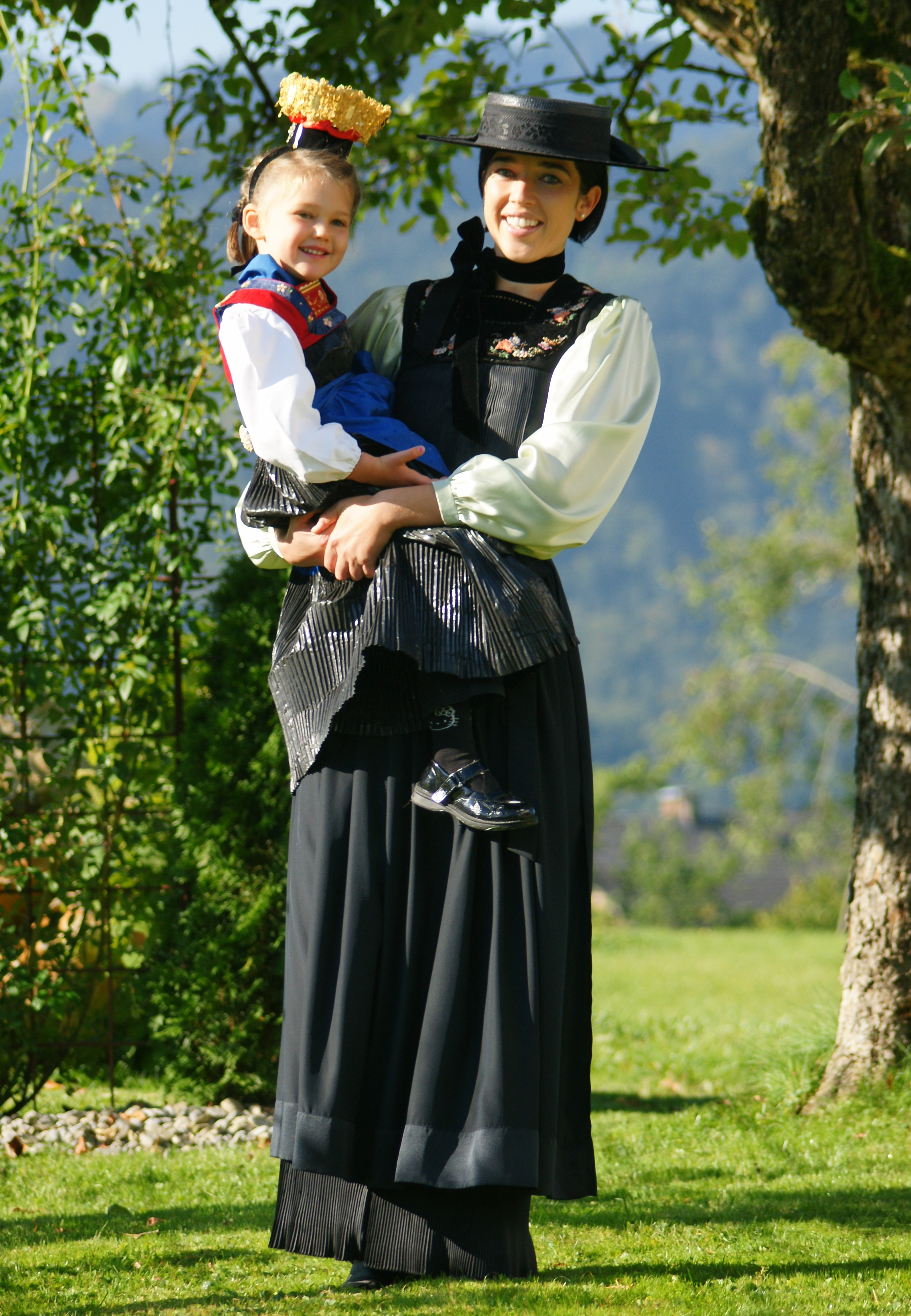 Die Merkmale der Bregenzerwälder Frauentracht (der Juppe) sind, die silberne Schnalle, der "Bleotz", welcher kunstvoll mit gold-silbernen Stickereinen versehen ist, der "Keadoro", ein kunstvoll goldsilberner bestickter Zierstreifen am Rücken und die verschiedenen Kopfbedeckungen. Sie sind ein ganz besonderes Markenzeichen der Wäldertracht. "Spitzkappe (für den Kirchgang)", "Brämokappo (Pezlkappe aus Seehundfell)", "Stuoz", "Stucho (weisses Haartuch für die Trauer)", "Schäohut (Strohhut, Sommer)", "Kauffmannhut (Filzhut, Übergangszeit)" und als Meisterstück das "Schappale (Trachtenkrönele, Krönchen oder Flitterkrone)".